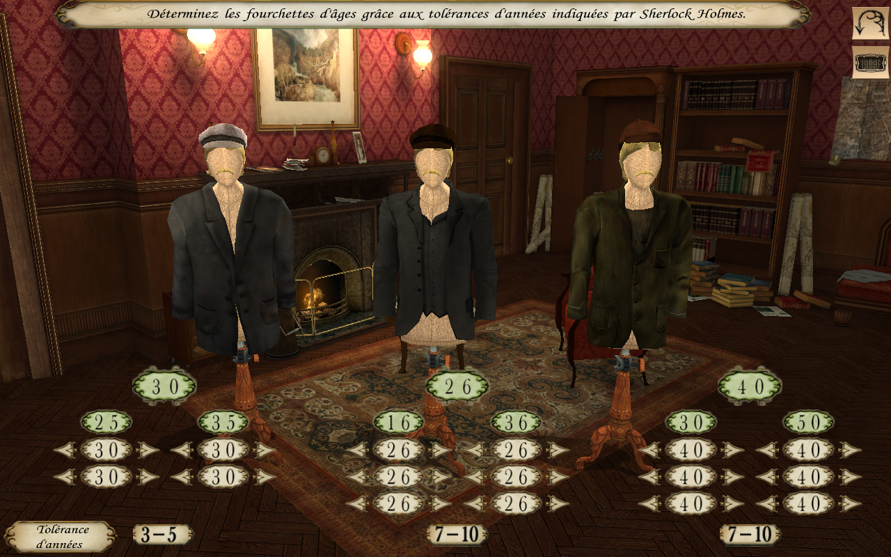 Capture d'écran du jeu Sherlock Holmes contre Jack l'Éventreur. Il s'agit ici de retrouver l'âge que doit avoir le meurtrier en comparant les différents témoignages récoltés au cours du jeu.